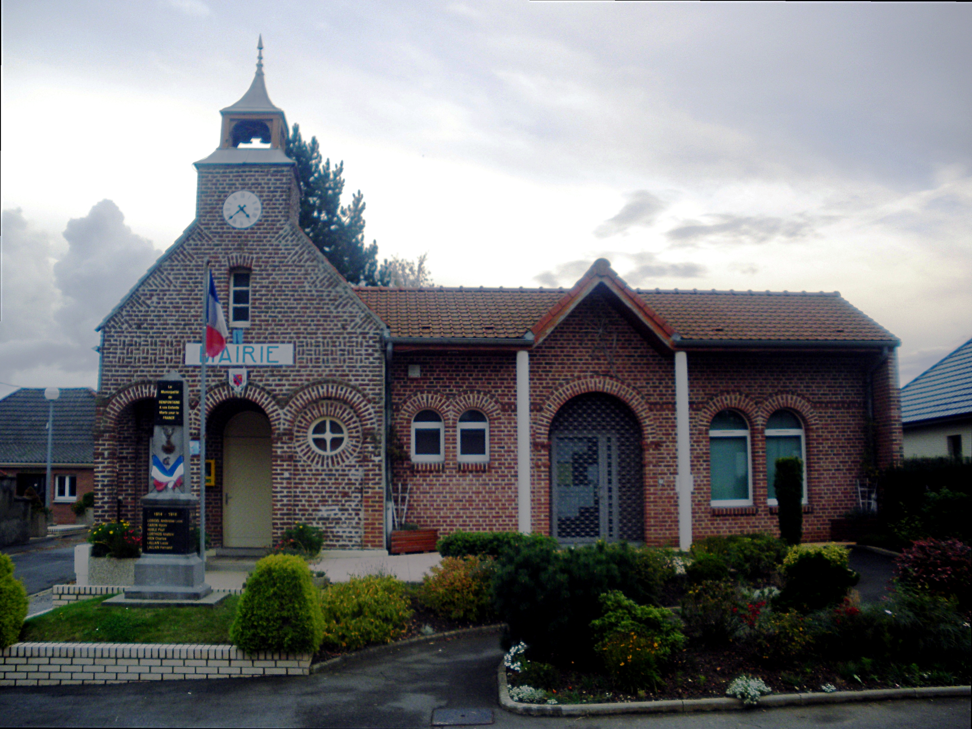 Vue de la mairie de Bénifontaine.